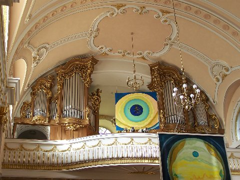 Orgel der Marienkirche Offenbach am Main